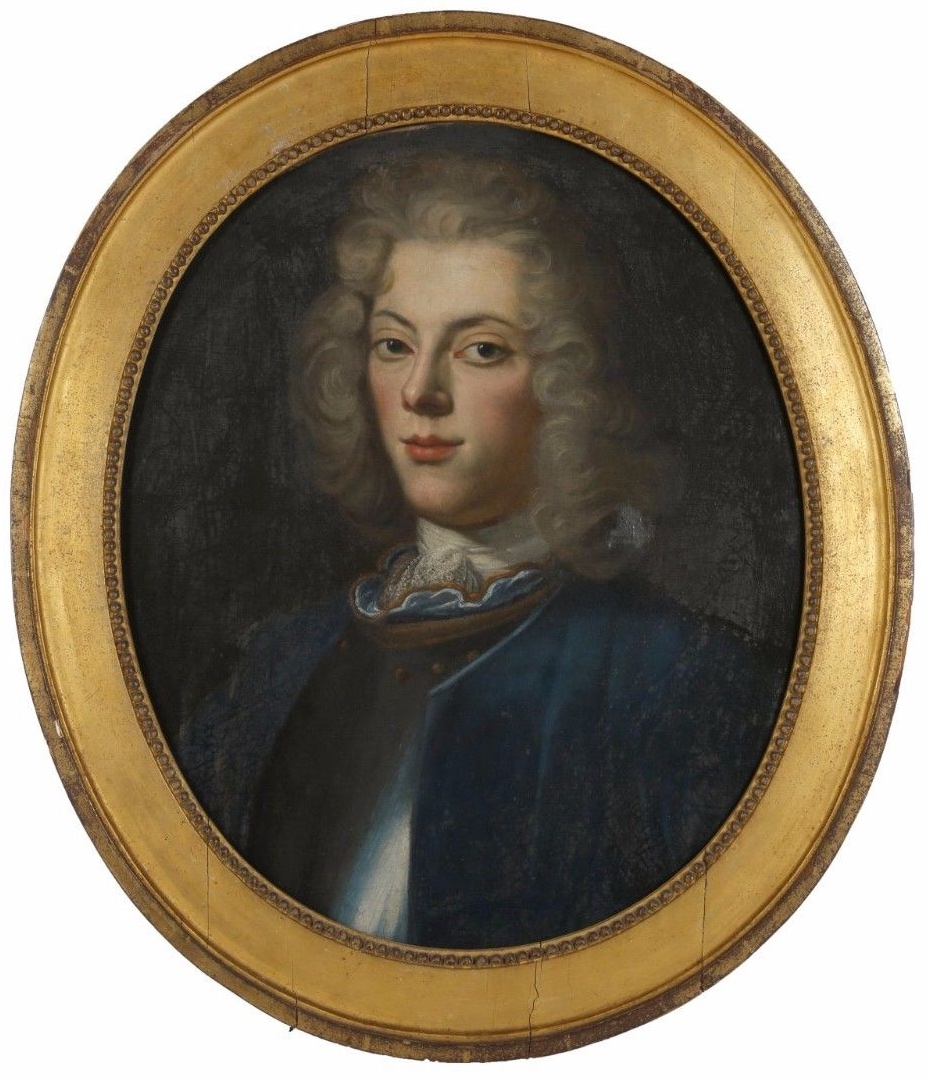 Gustaf Ulf Bonde (1698-1772) iklädd blå rock med harnesk. Avporträtterad ca 1730 av okänd, men kanske någon i kretsen av Michael Dahl.